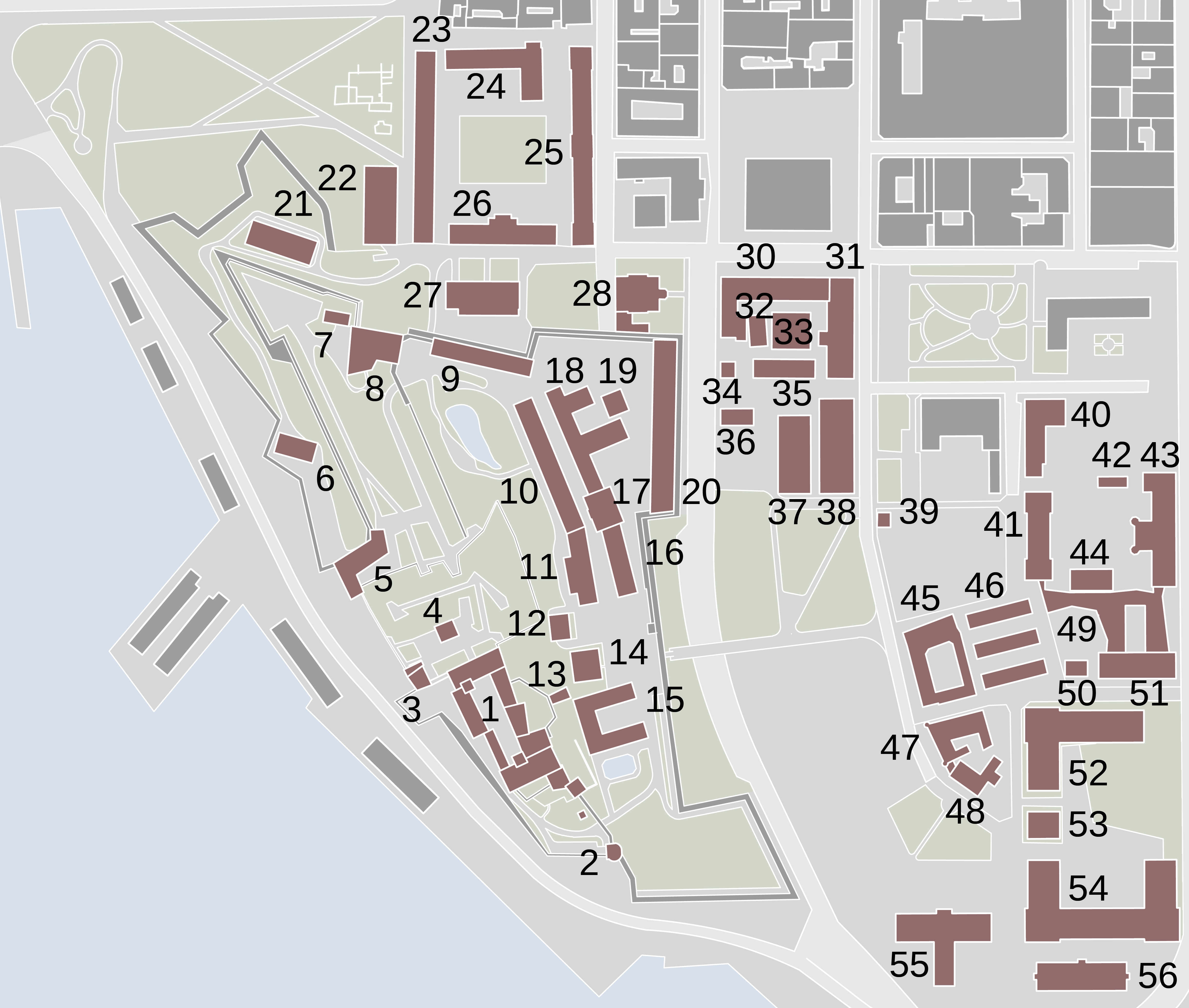 Übersichtskarte über die Gebäude der Festung Akershus 1 Schloss, 2 Munks tårnet, 3 Knuts tårnet , 4 Corps de Garde, 5 Hjemmefrontmuseet, Det dobbelte batteri, 6 Laboratiorikjøkkenet, 7 Blykjelleren, 8 Skarpenorts, 9 Det lange røde hus, 10 Store Provianthus, 11 Bakeriet, 12 Fengselsdirektørboligen, 13 Den store pille, 14 Hovedvakten, 15 Barakker, 16 Kornmagasinet, 17 Fengselskirken, 18 Den lille Provianthus, 19 Kronprinsens kruttårn, 20 Halmlageret, 21 Høymagasinet, 22 Ridehuset på Kontraskjæret, 23 Kavalleristallen, 24 Ingeniørstallen, 25 Artilleriestallen, 26 Kavallerikasernen, 27 Offisersstallen 28 Oslo militære samfund 30 Forsvarsdepartmentet, 31 Armeens depot, 32 Intendanturverkstedet, 33 Konferansehuset, 34 Forbrenningsovnhuset, 35 Artillerigården, 36 daghuset, 37 Det nye Ridehus, 38 Det gamle Ridehus 39 Hovedportens vakt, 40 Stabsmusikken, 41 Skolebygningen, 42 ? 43 Verkstedbygningen, 44 Artilleriets Kontorbygning 45 Materialgården, 46 Nordre, Midtre, und Søndre barakke, 47 General Glads Gård, 48 Kommandantskapet, 49 ? 50 Kommandantens stall 51 ? 52 Artillerimagasinet, 53 Arsenalforvalterboligen, 54 Hovedarsenalet, 55 Festningens gymnastikksal, 56 Artillerikasernen